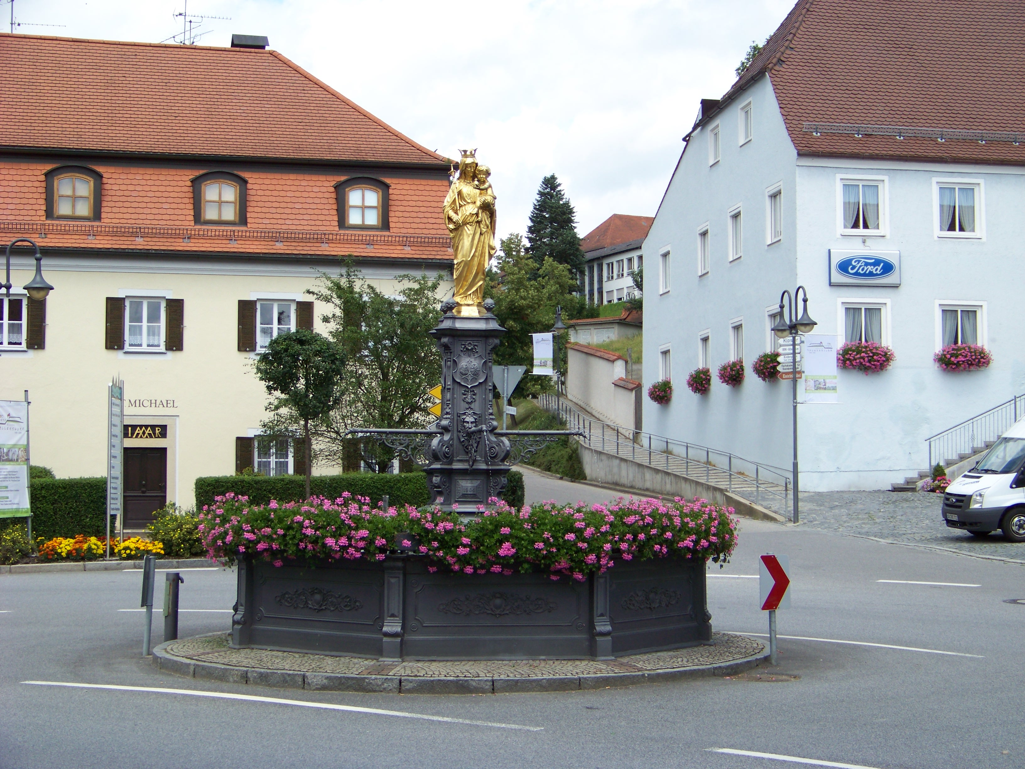 Mallerdorf Marienbrunnen